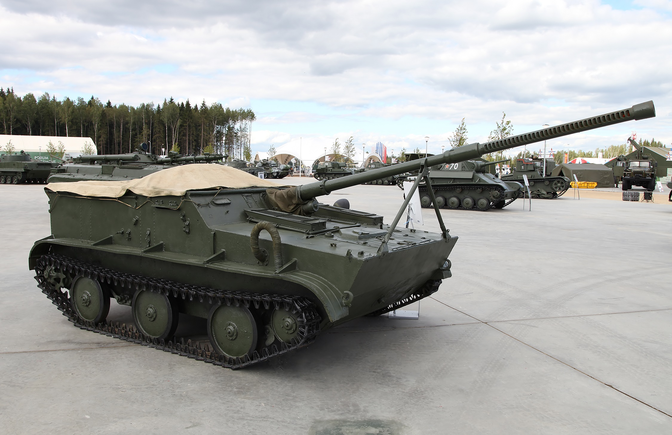 Авиадесантная самоходная пушка К-73 в экспозиции парка "Партриот".